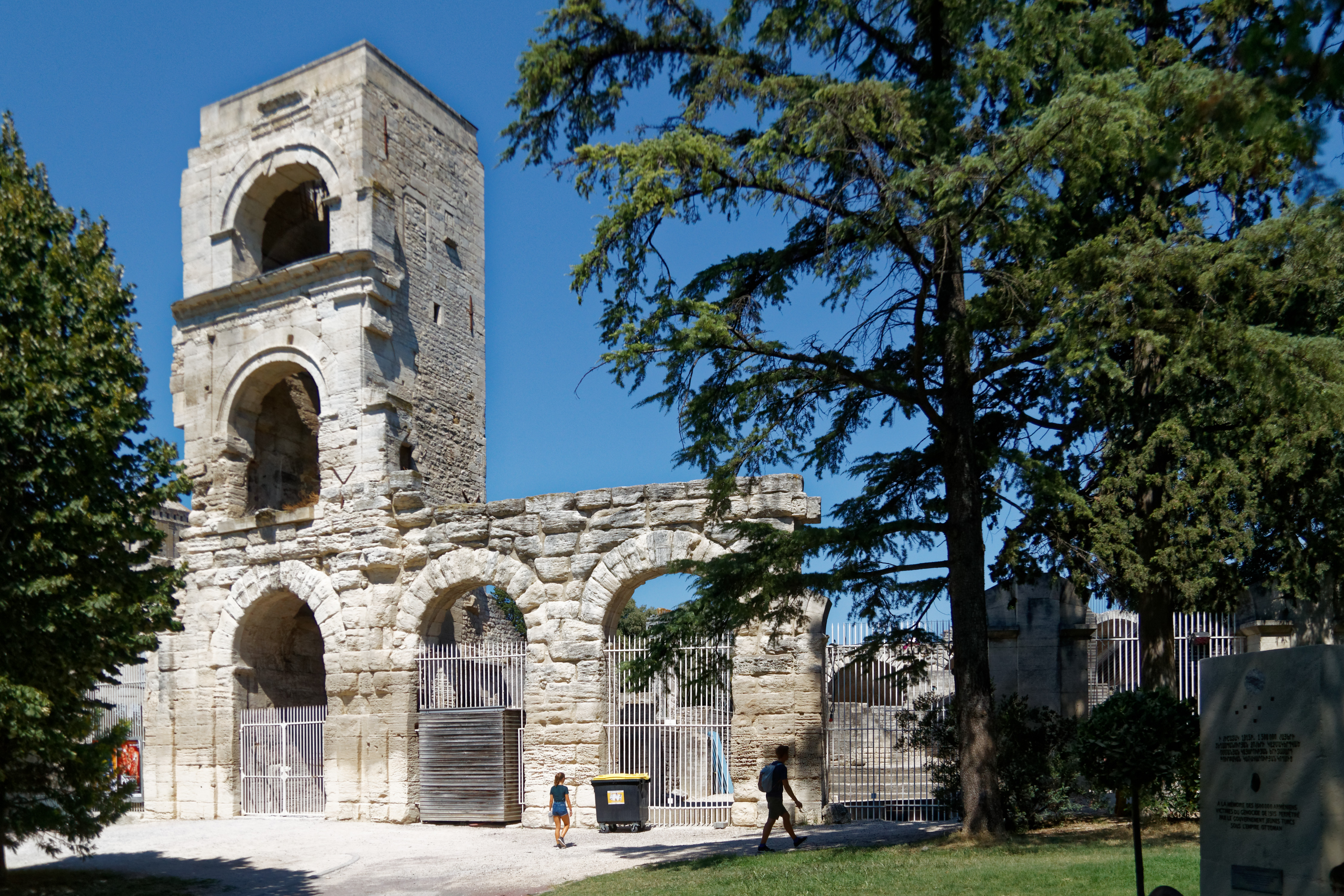 Antikes Römisches Theater in Arles